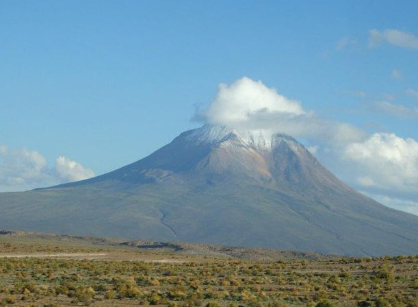 Nevado Cariquima o Mama Huanapa es un cerro isla, ubicado en el altiplano de la Región de Tarapacá (Chile)